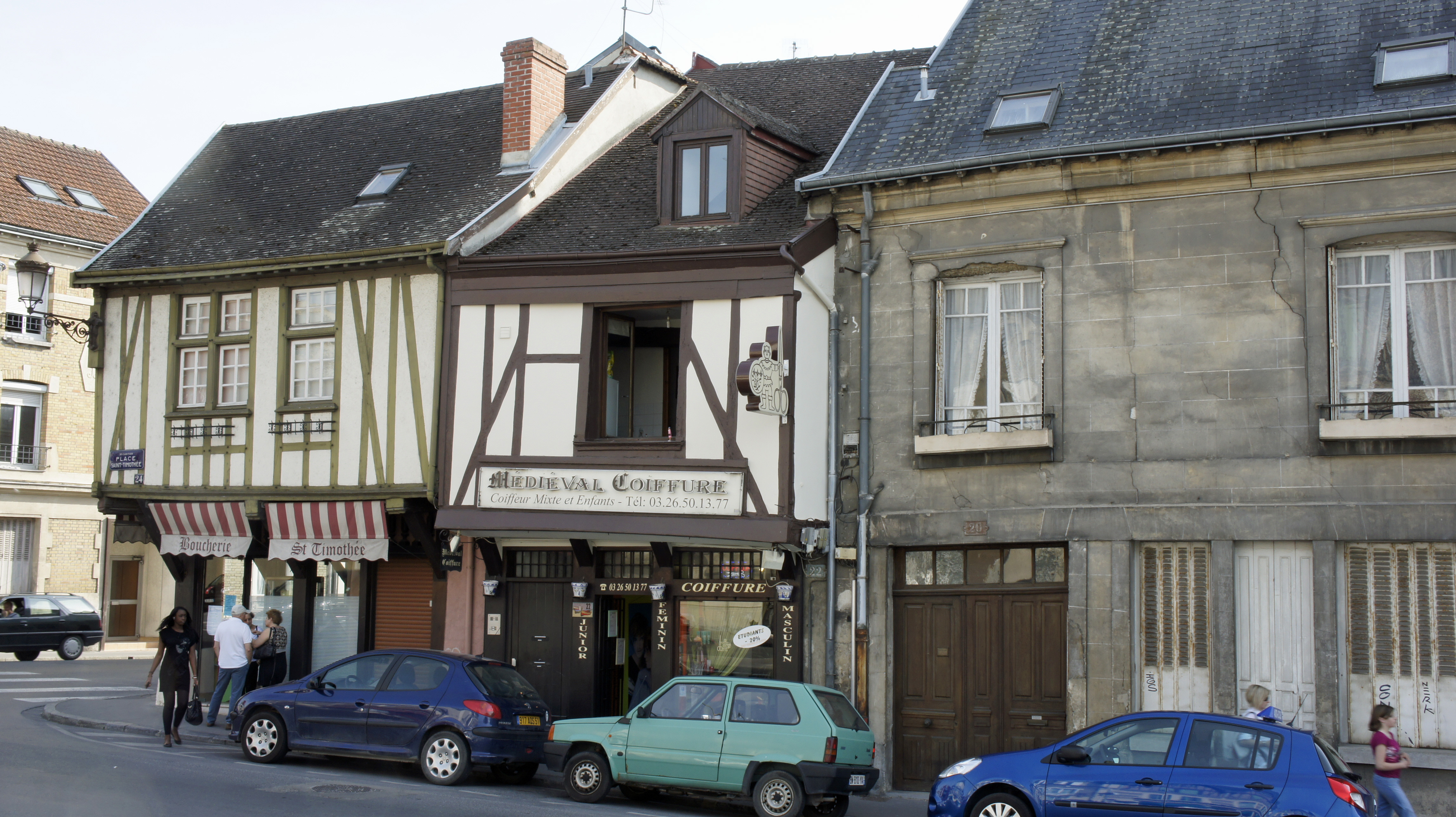 Maisons à pans-de-bois rue Dieu Lumière. Les numéros 20-22, aussi appellé biscuiterie Derungs Frères est inscrit à l'inventaire des monuments historiques.